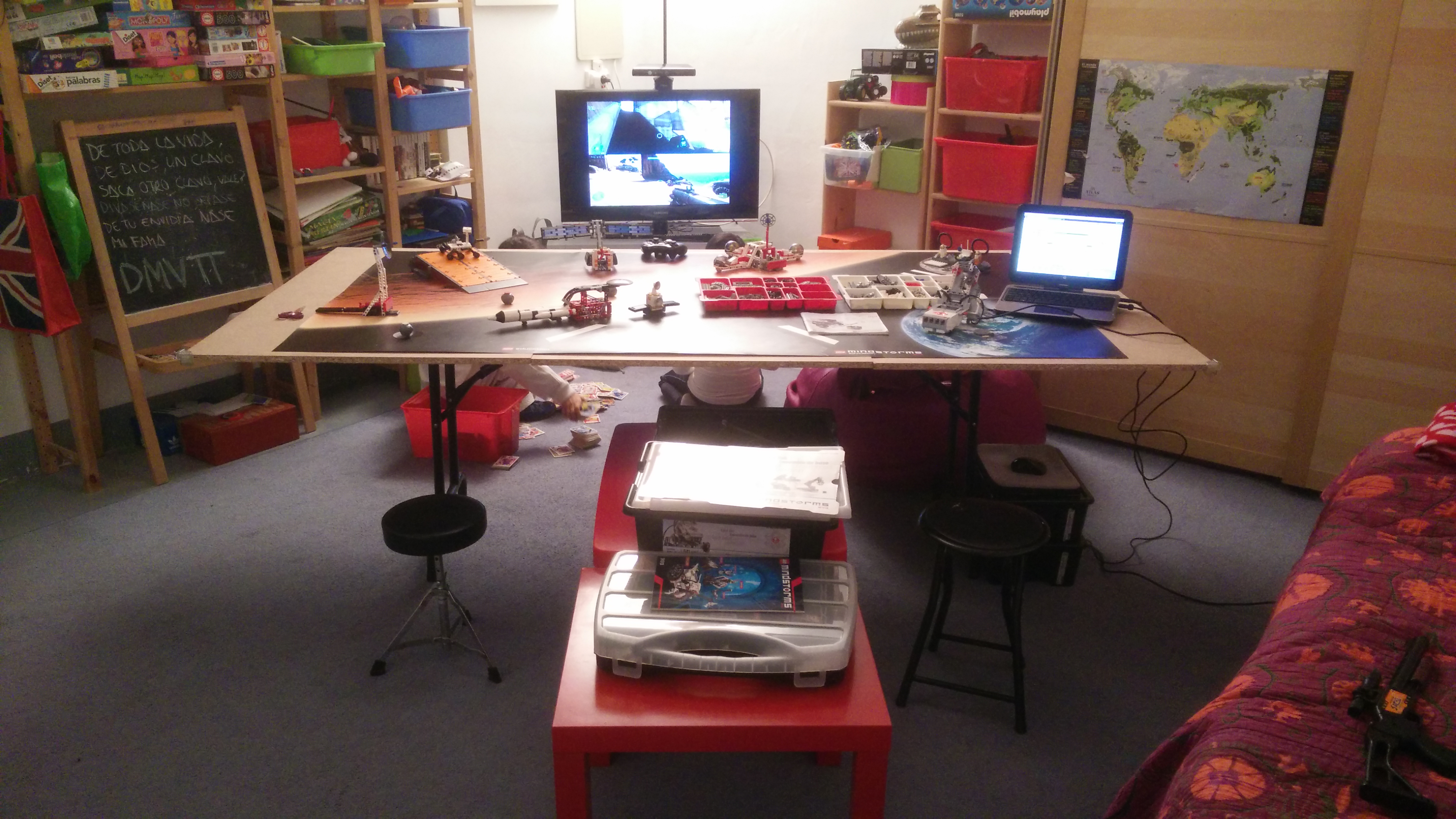 Mesa de trabajo y entorno de aula para practicar actividades de robótica educativa